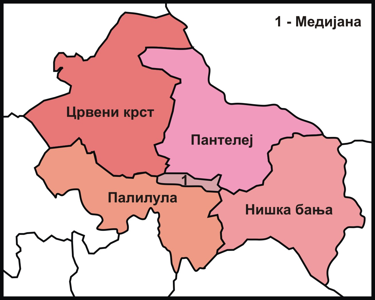 Нишке градске општине.